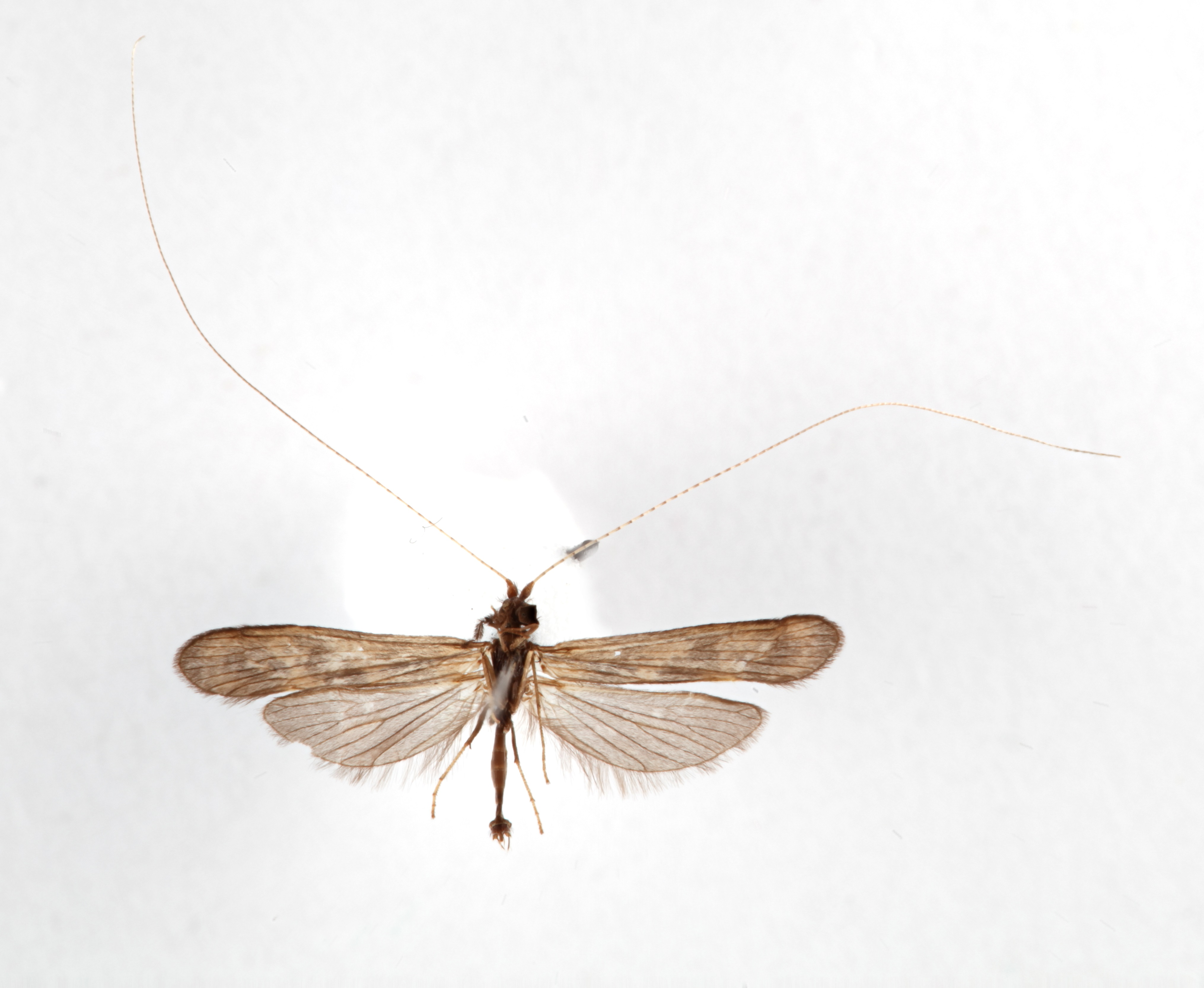 NHRS-KAJO 000003519 vent